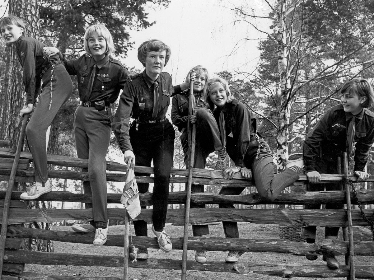 Flickscoutpatrull på 50/60-talet